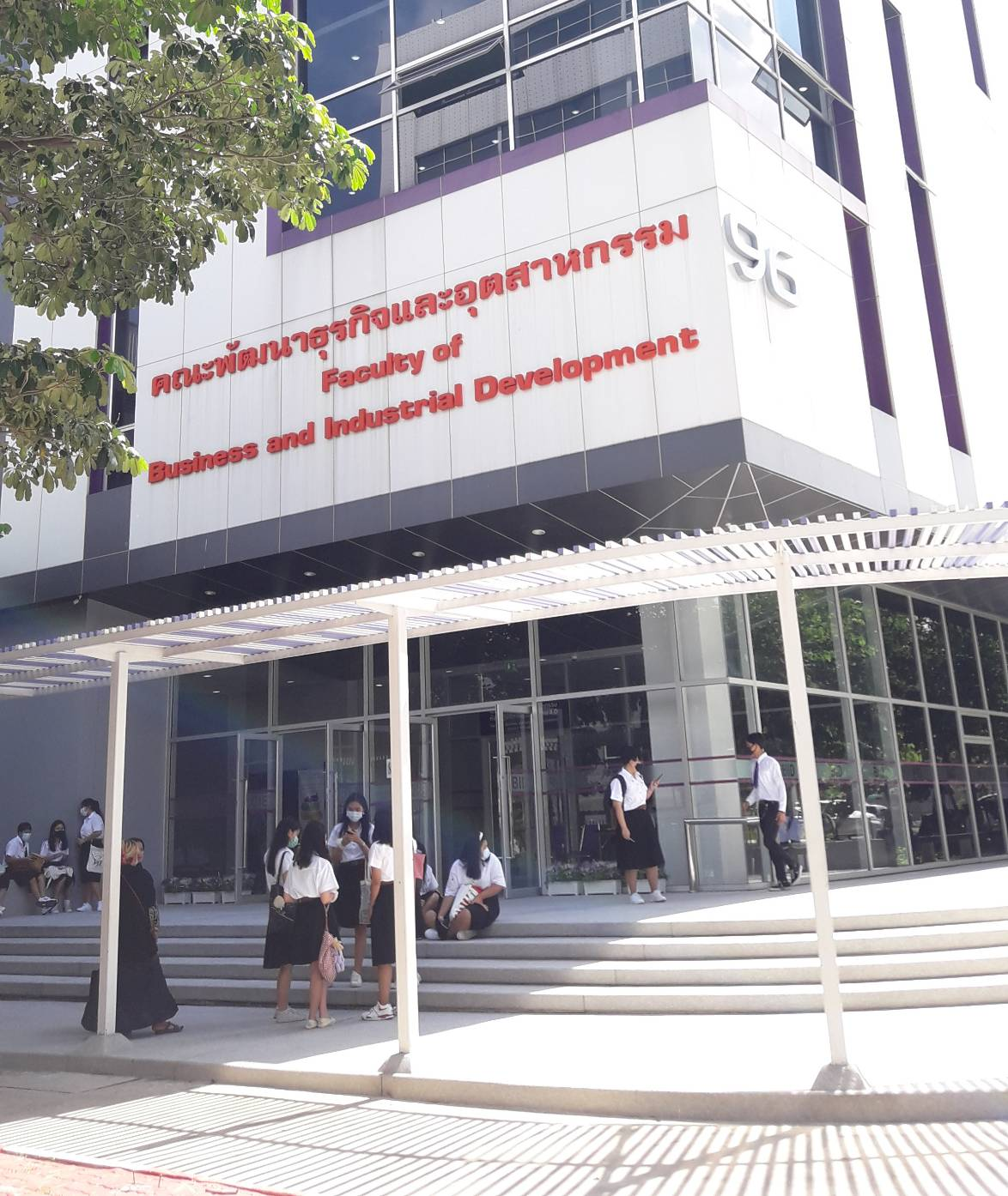 ตัวอาคาร 96 ในวิทยาเขตกรุงเทพมหานคร ที่ตั้งของคณะพัฒนาธุรกิจและอุตสาหกรรม